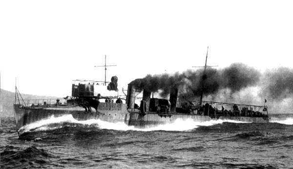 Il cacciatorpediniere Ascaro in navigazione in velocità